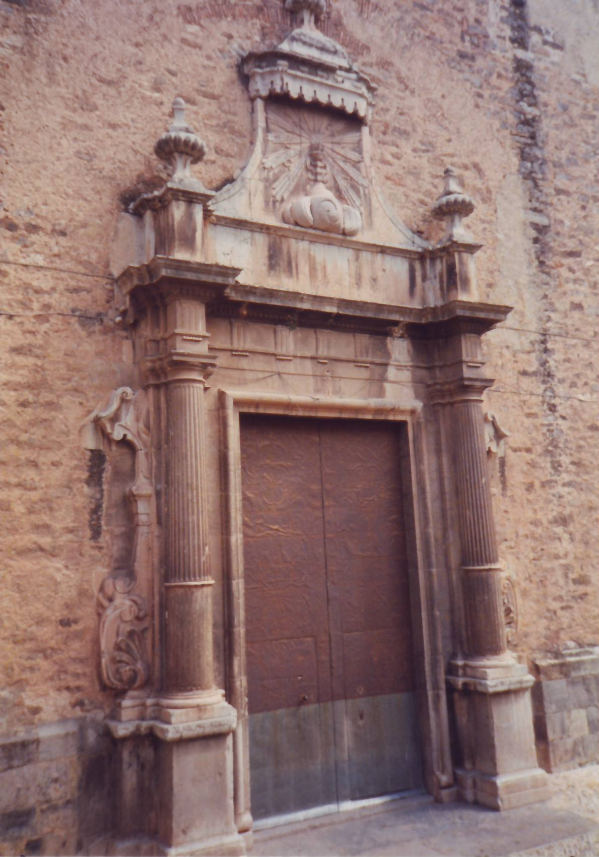 Porta de la Capella de la Comunió de l'Església de l'Assumpció d'Onda